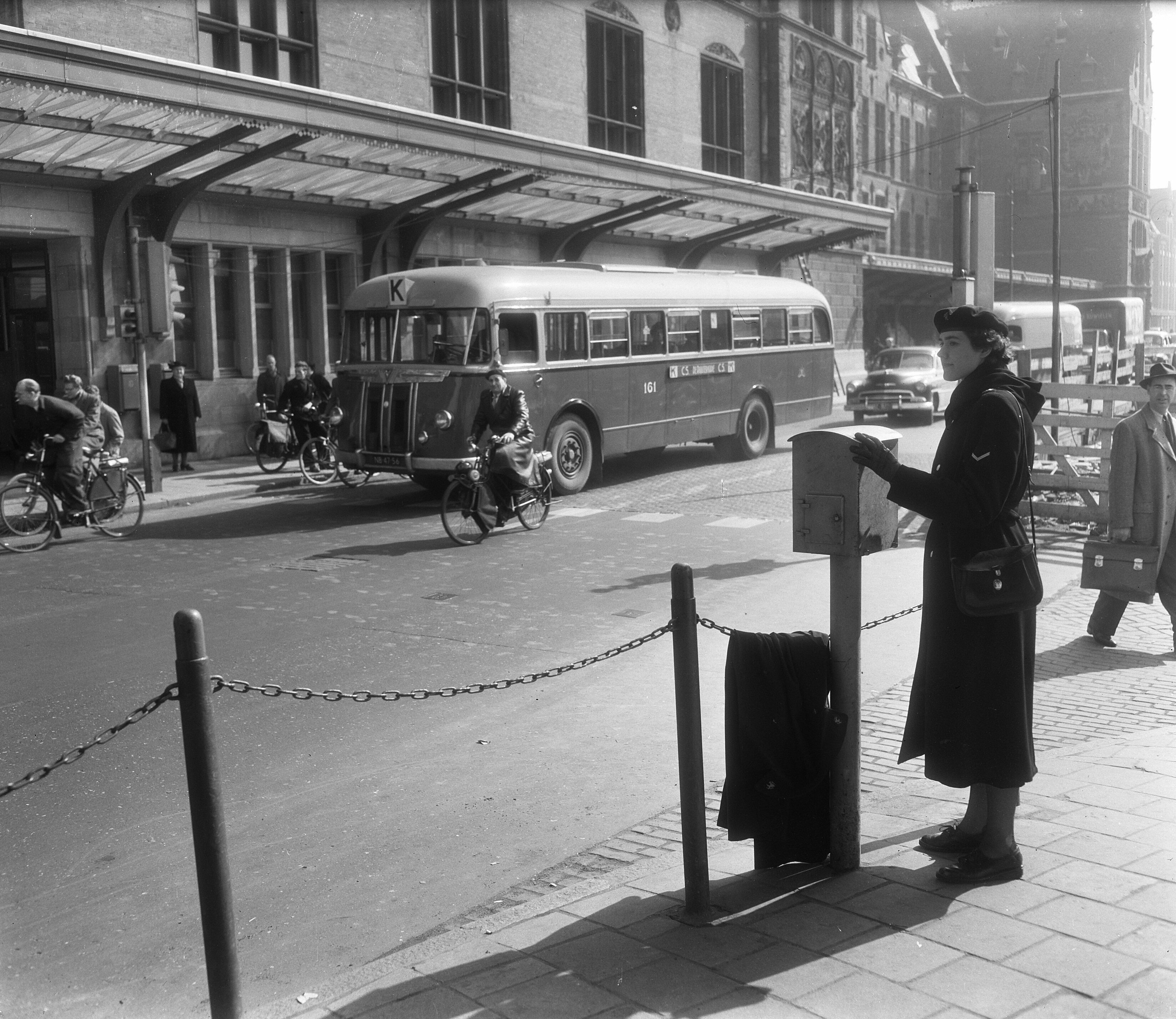 Collectie / Archief : Fotocollectie Anefo Reportage / Serie : [ onbekend ] Beschrijving : Serie vrouwelijke politie Amsterdam Datum : 16 mei 1955 Locatie : Amsterdam, Noord-Holland Trefwoorden : POLITIE Fotograaf : Rossem, Wim van / Anefo Auteursrechthebbende : Nationaal Archief Materiaalsoort : Glasnegatief Nummer archiefinventaris : bekijk toegang 2.24.01.09 Bestanddeelnummer : 907-1369